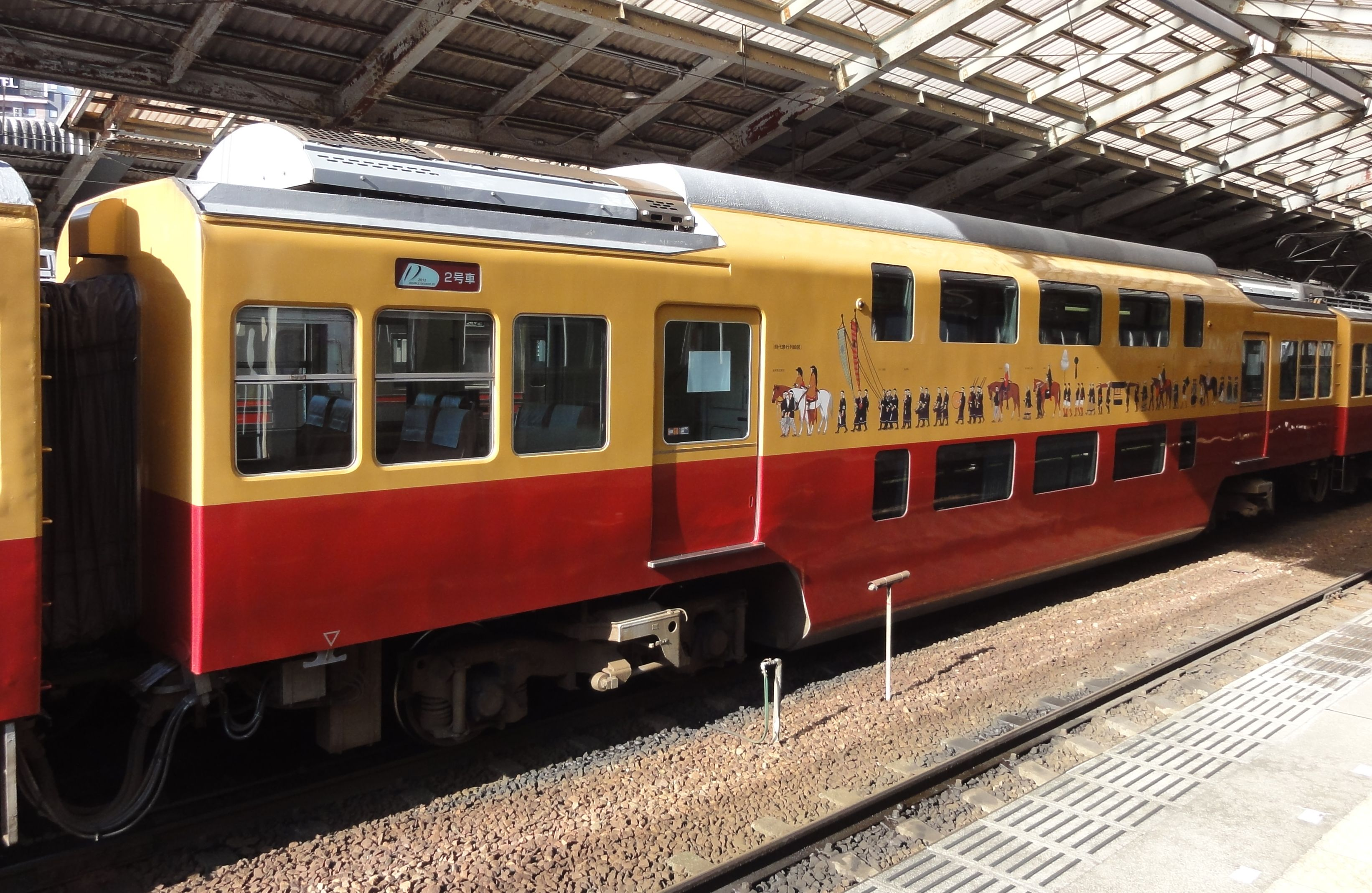 富山地方鉄道10030形電車サハ31